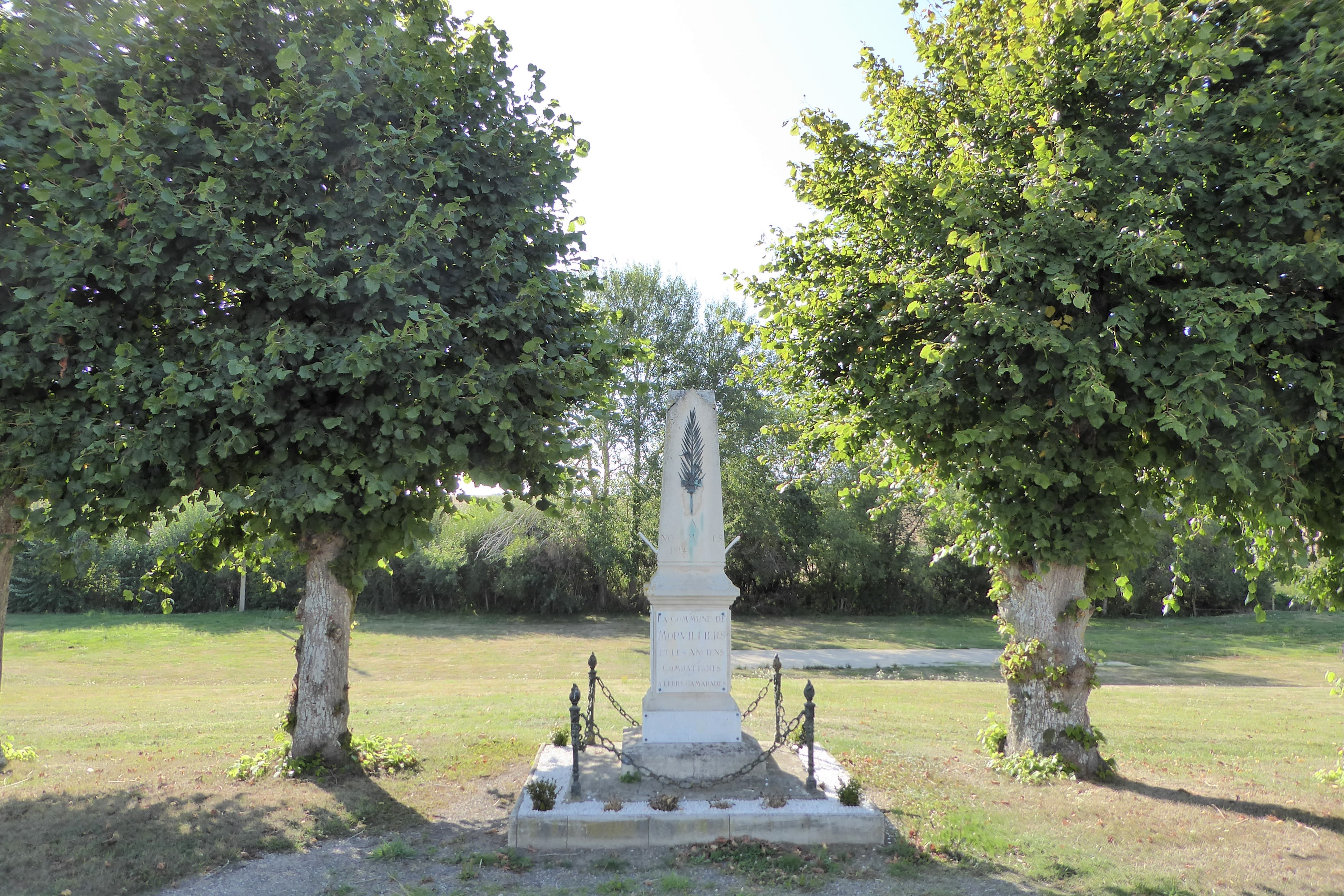 Monument aux morts de Morvilliers, Eure-et-Loir, France.